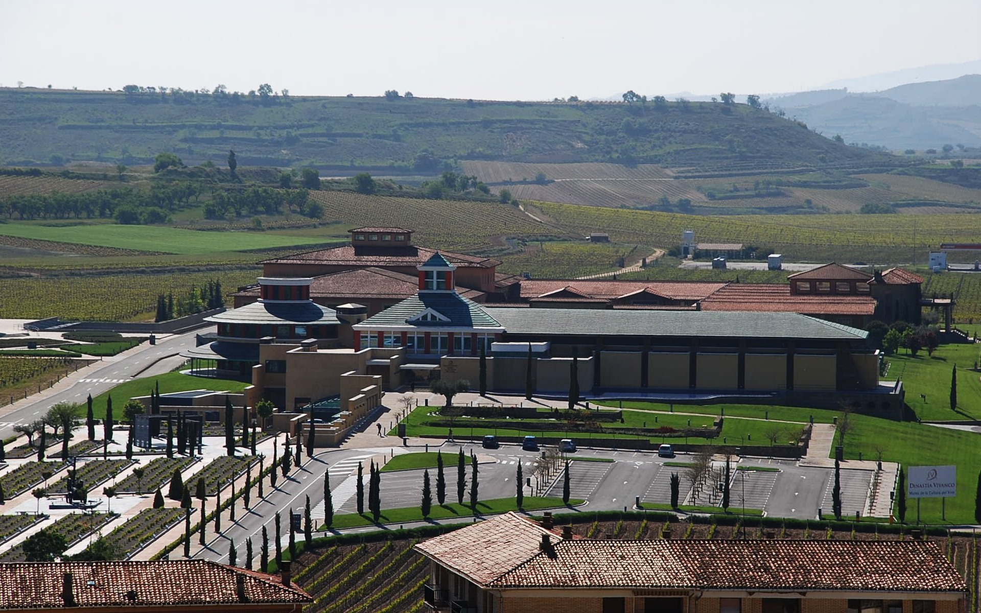 Museo del Vino en Briones (La Rioja - España).